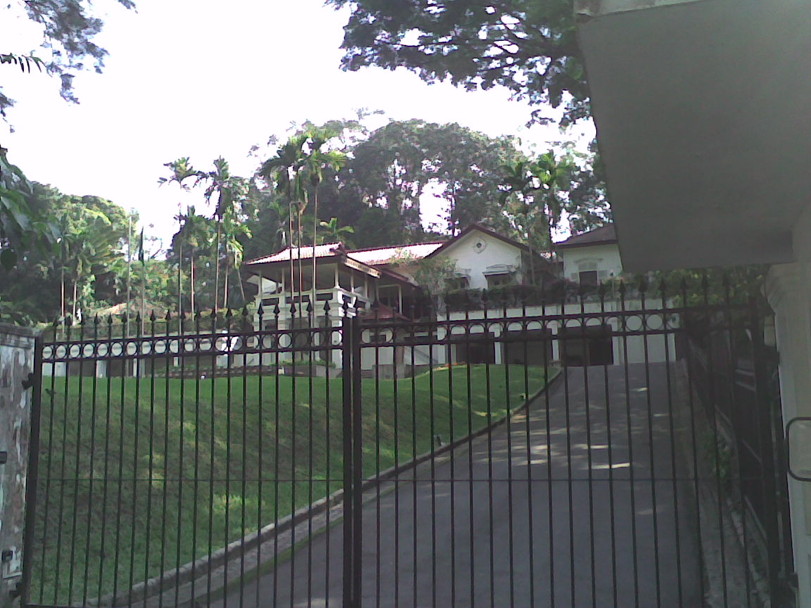 Saudi Embassy in Singapore